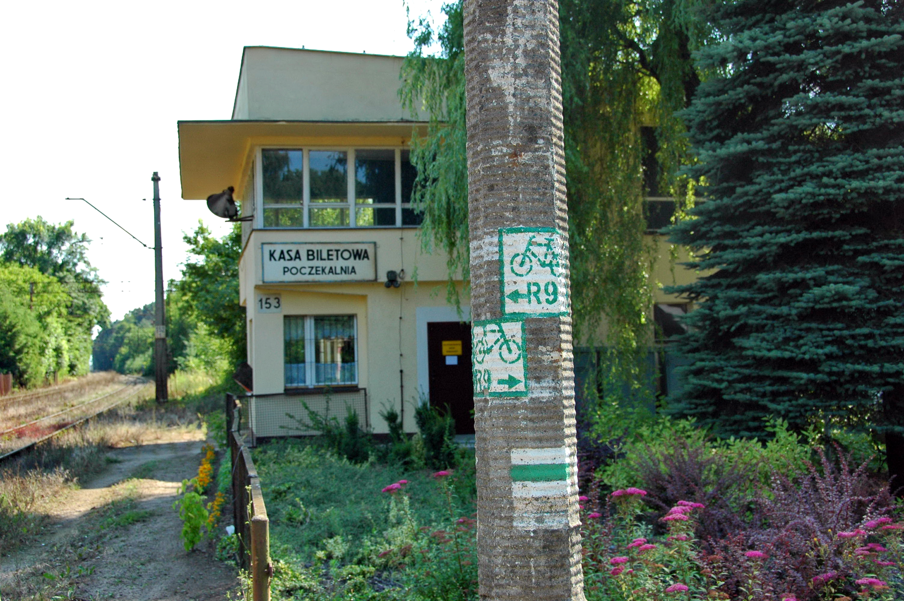 zdjęcie zrobione przy stacji PKP Puszczykowo